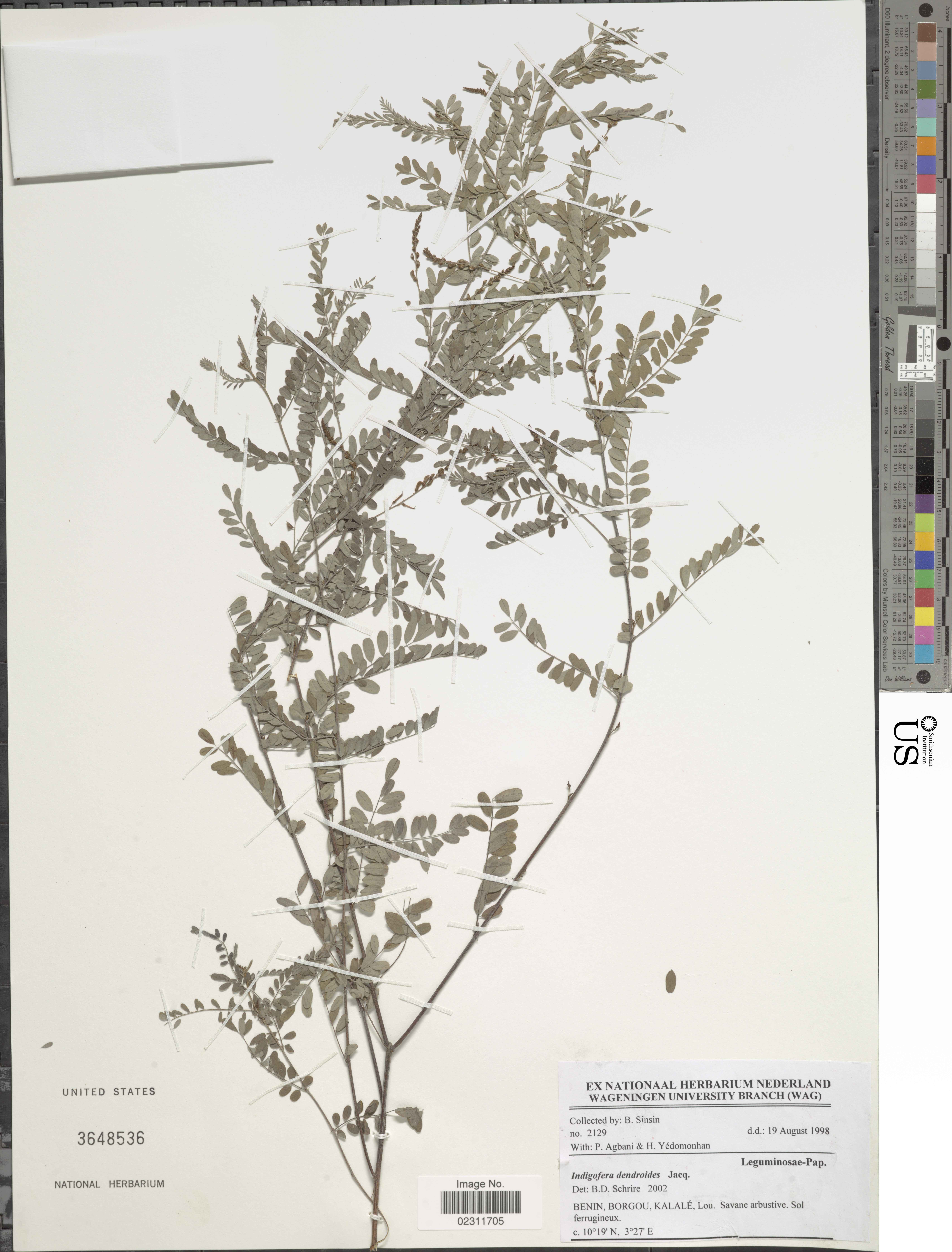 Indigofera dendroides Jacq. Object Details Biogeographical Region 22 - West Tropical Africa Collector B. Sinsin P. Agbani H. Yedomonhan Record Last Modified 29 Dec 2017 Specimen Count 1 Collection Date 19 Aug 1998 Barcode 02311705 USNM Number 3648536 Place Kalale, Lou, Borgou, Benin, Africa Published Name Indigofera dendroides Jacq. Taxonomy Plantae Dicotyledonae Rosales Fabaceae Faboideae NMNH - Botany Dept. Record ID nmnhbotany_13322820 Usage of Metadata (Object Detail Text) CC0 GUID (Link to Original Record)